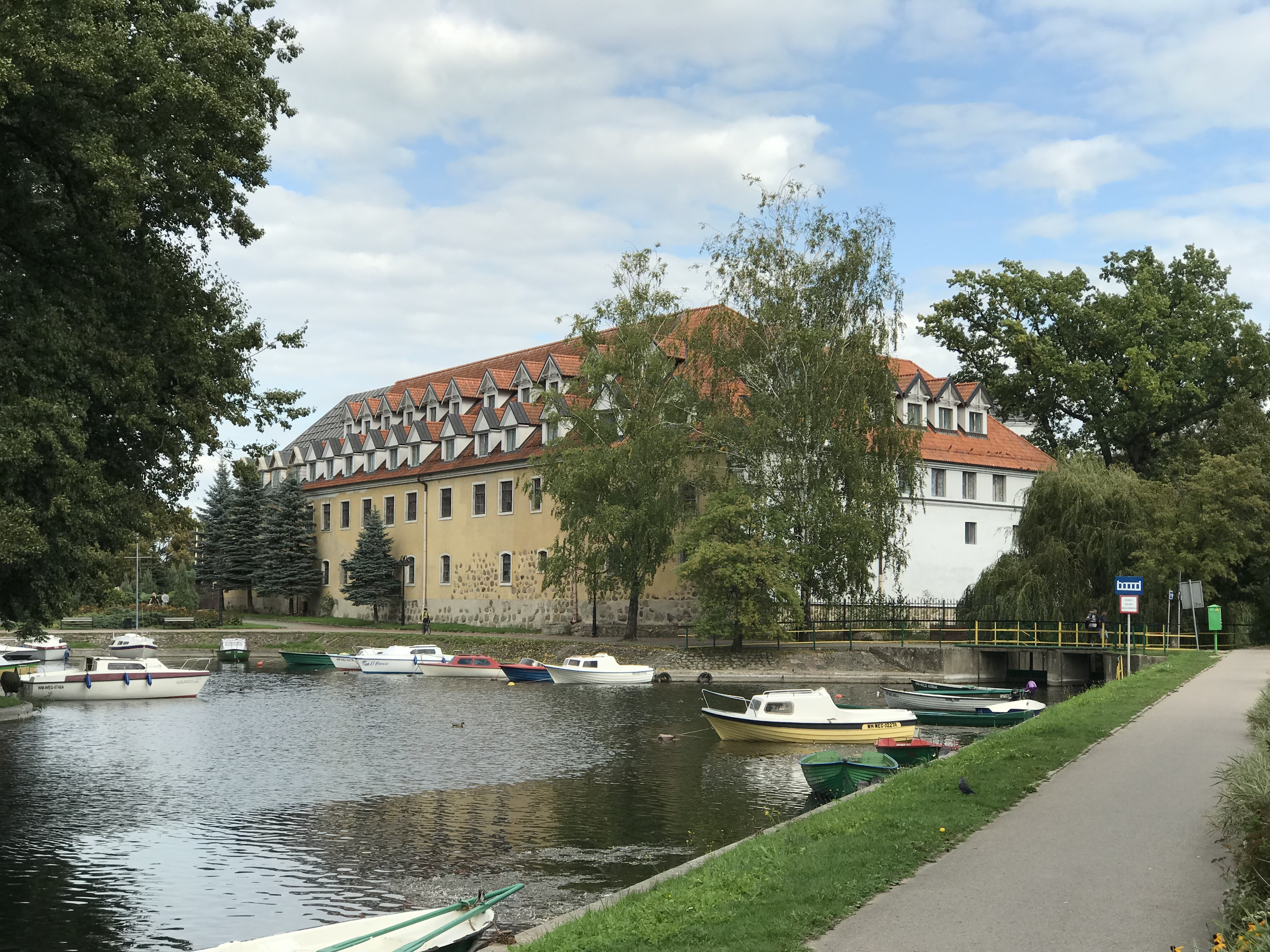 Zamek w Węgorzewie